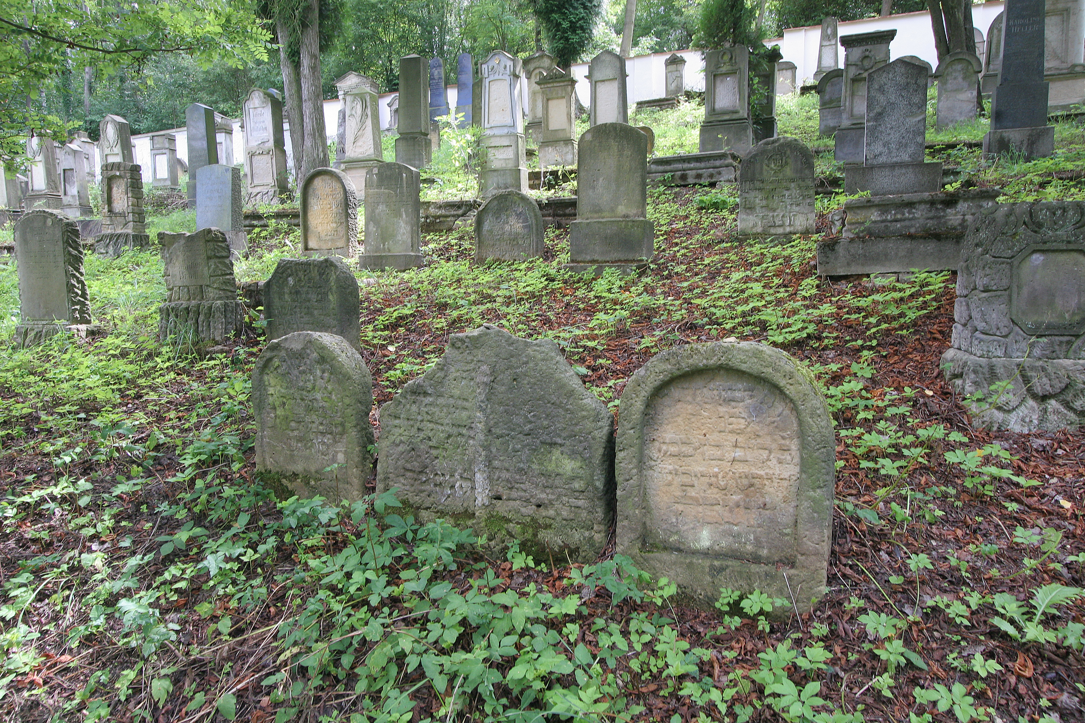 Židovský hřbitov (Úštěk), k. ú. Lhota u Úštěku, k. ú. Úštěk (České Předměstí)